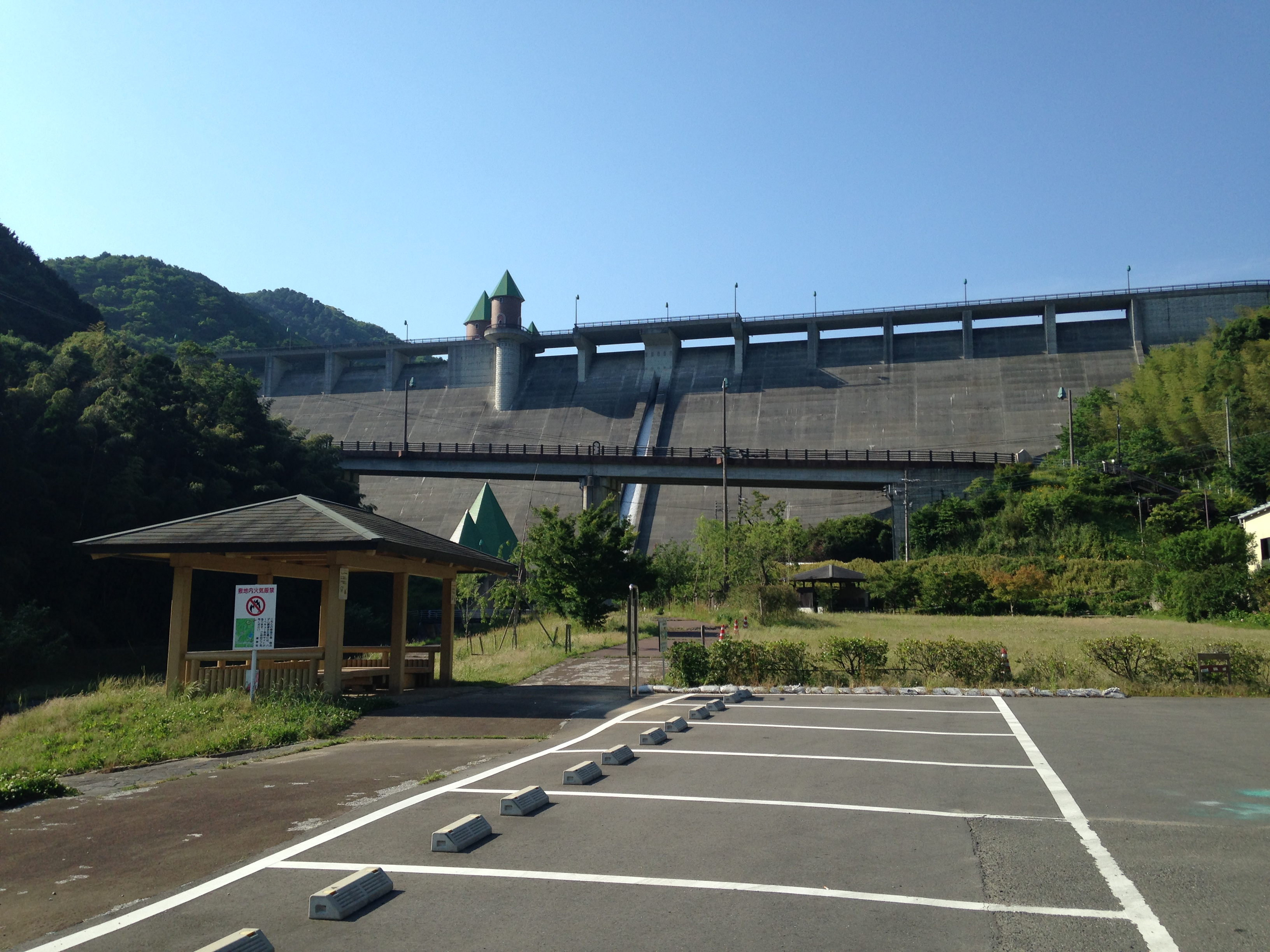 小川の公園より望む鳴淵ダム